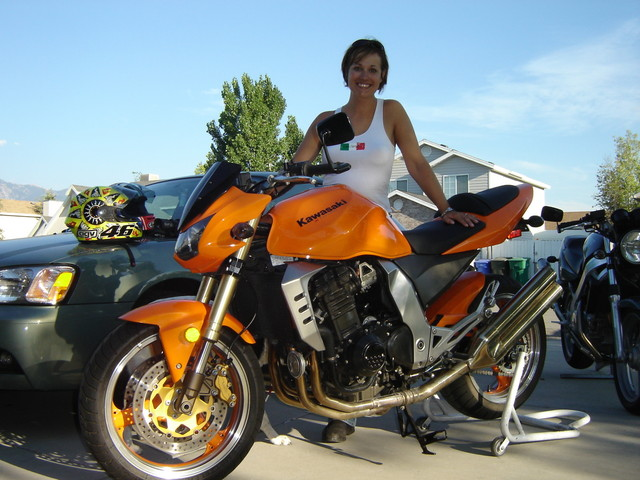 Kawasaki Z1000 (en)